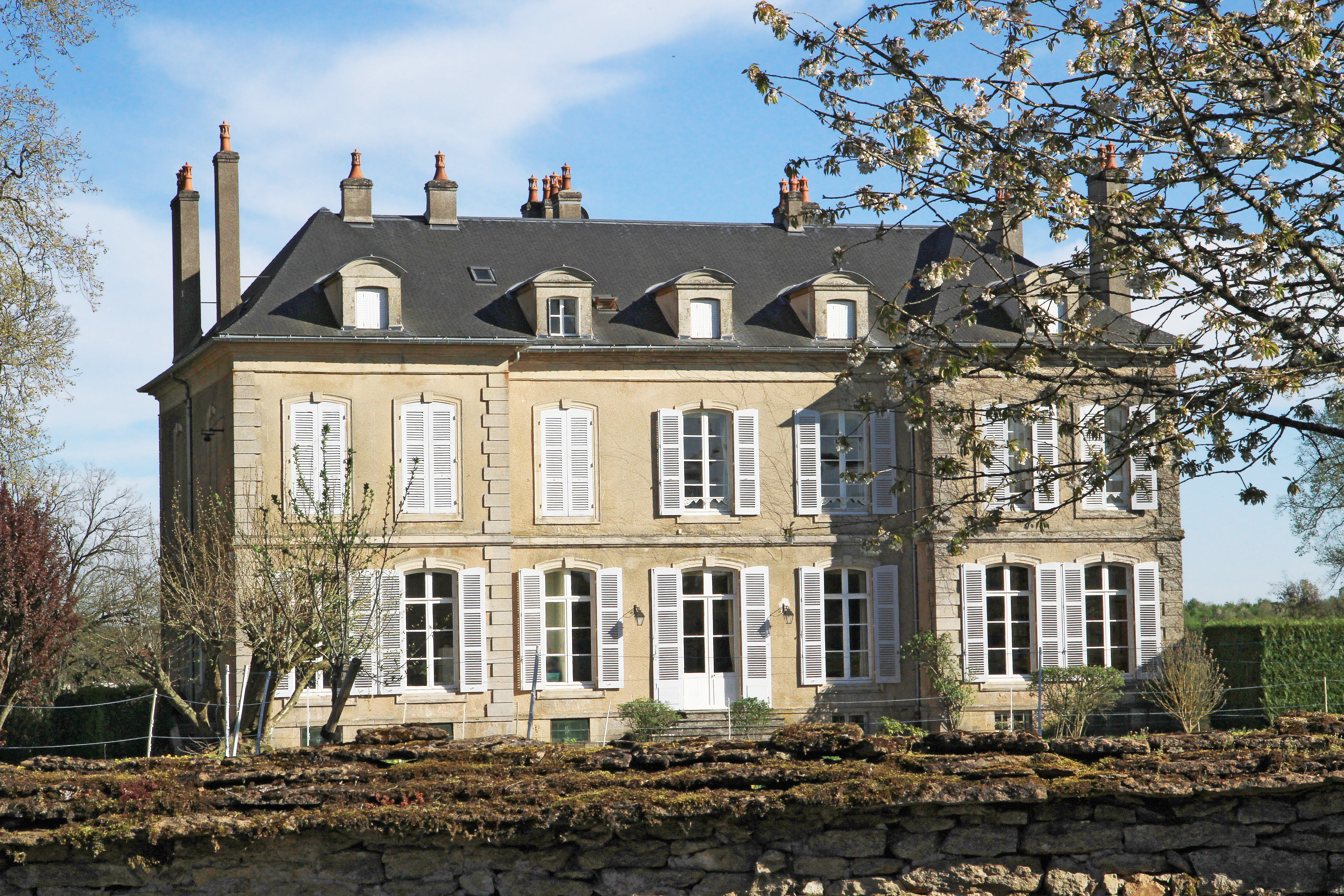 Château de Juillenay